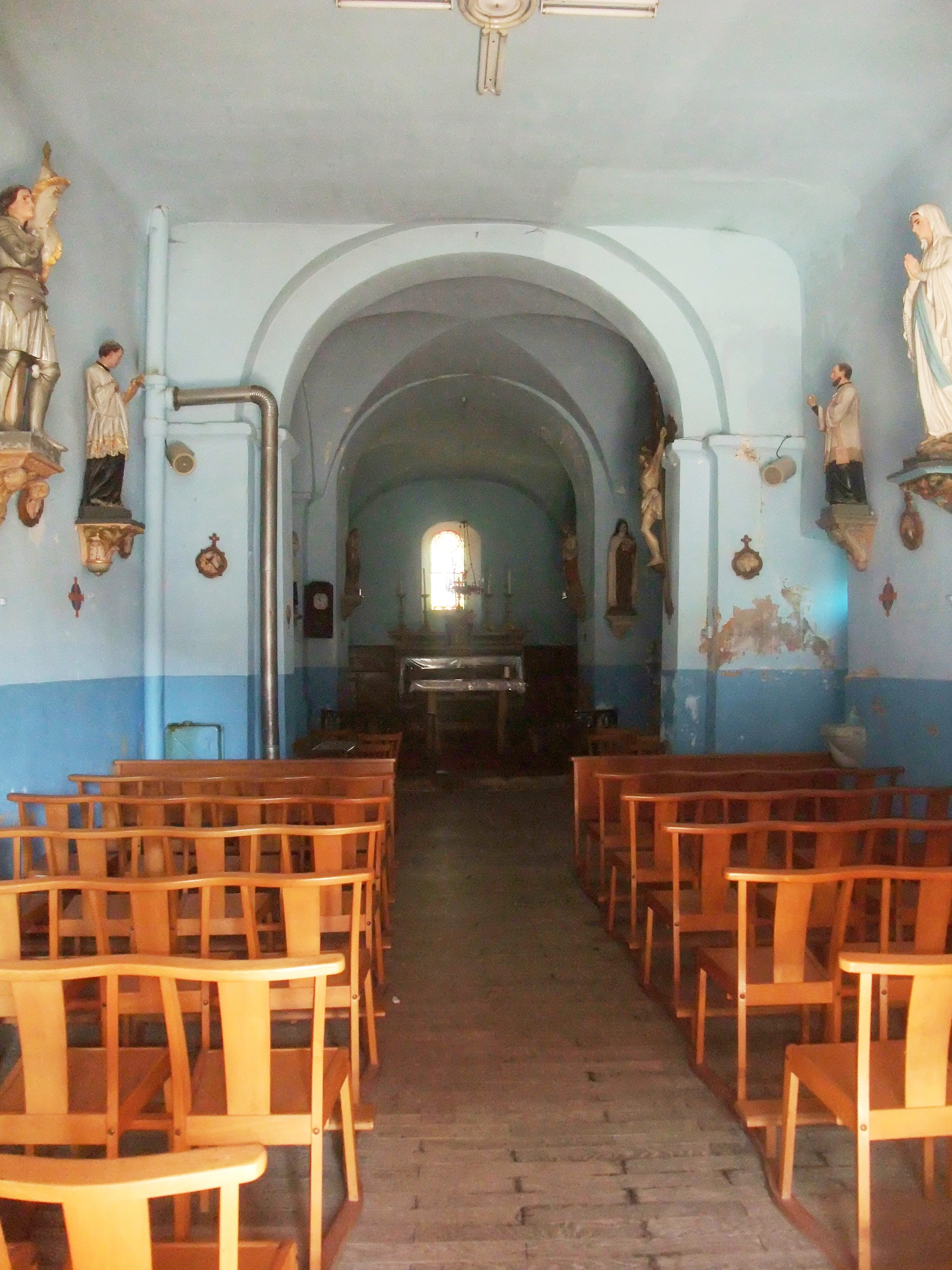 Monestier (Ardèche) église intérieur